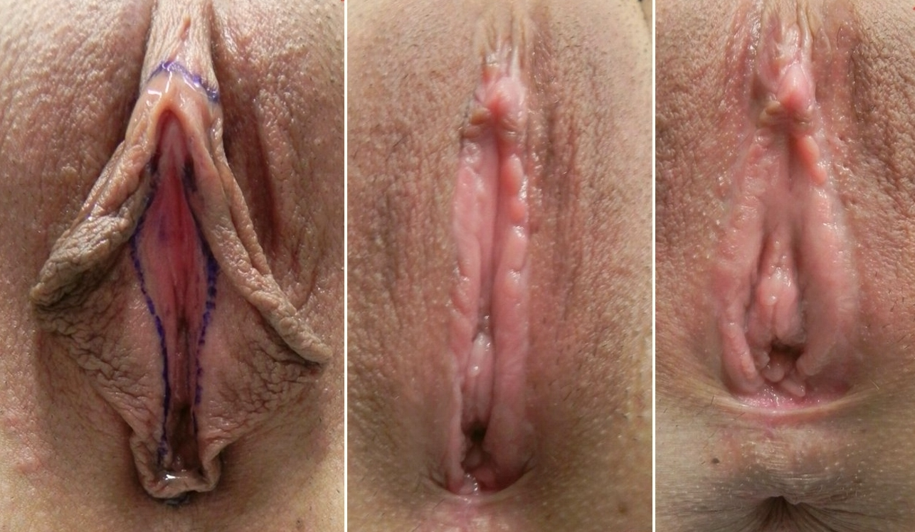 Cirugía de reducción del capuchón del clítoris y labios menores. El resultado es un aspecto refinado y elegante.